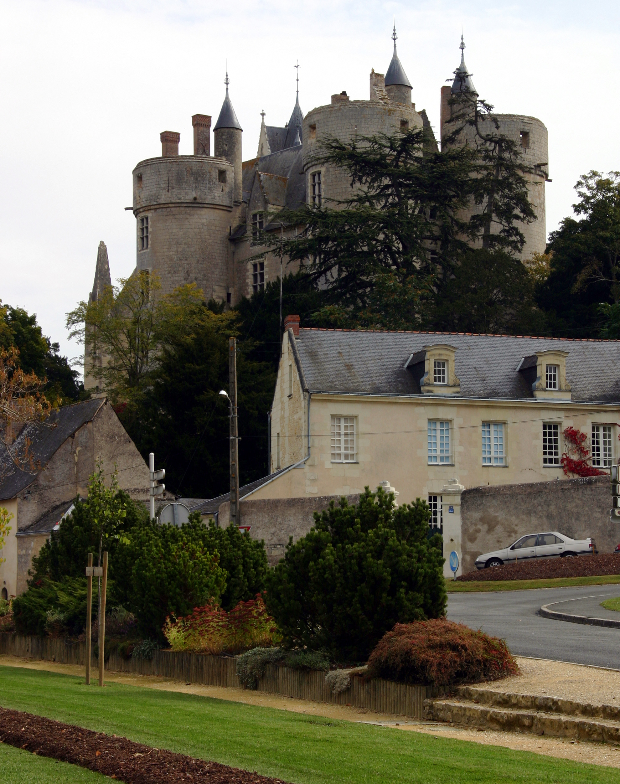 Schloss Montreuil-Bellay